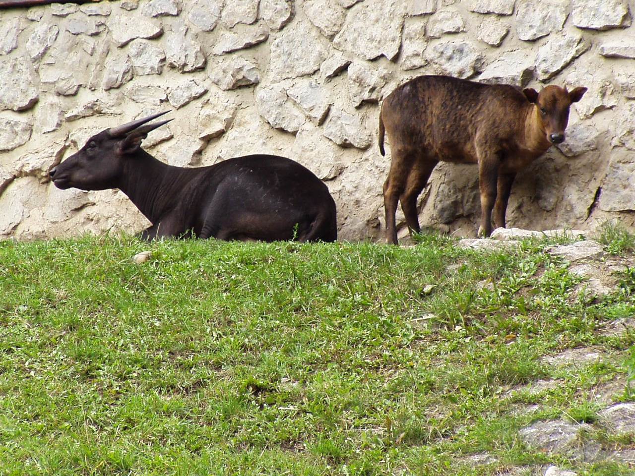 Bubalus depressicornis (Prague Zoo)